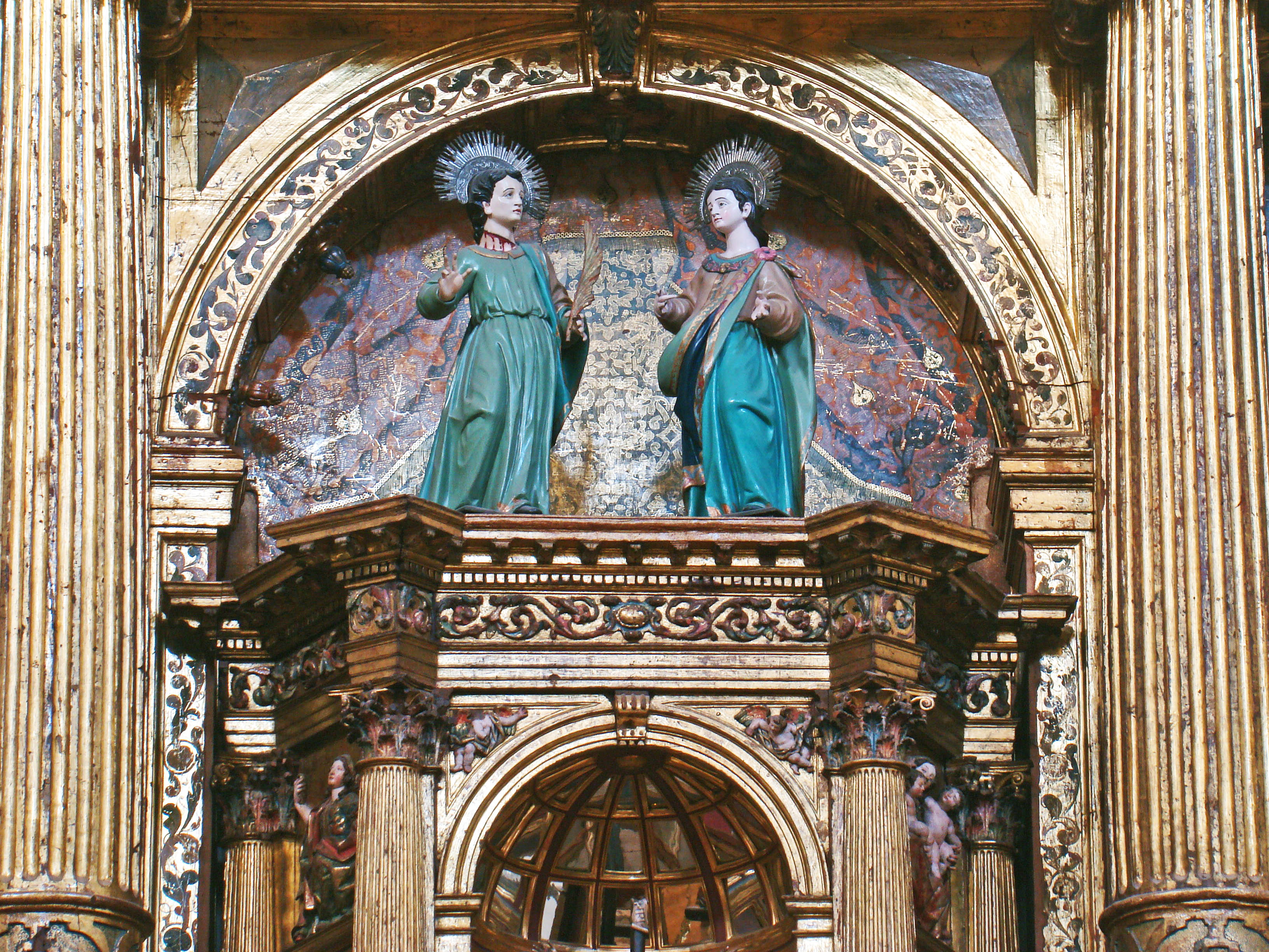 Esculturas de San Julián y Santa Basilisa procedentes de la desaparecida iglesia del mismo nombre, en Valladolid. En aquella iglesia se encontraban sobre el sagrario, lugar que ocupan también en su emplazamiento nuevo en la parroquia de San Miguel y San Julián en Valladolid.